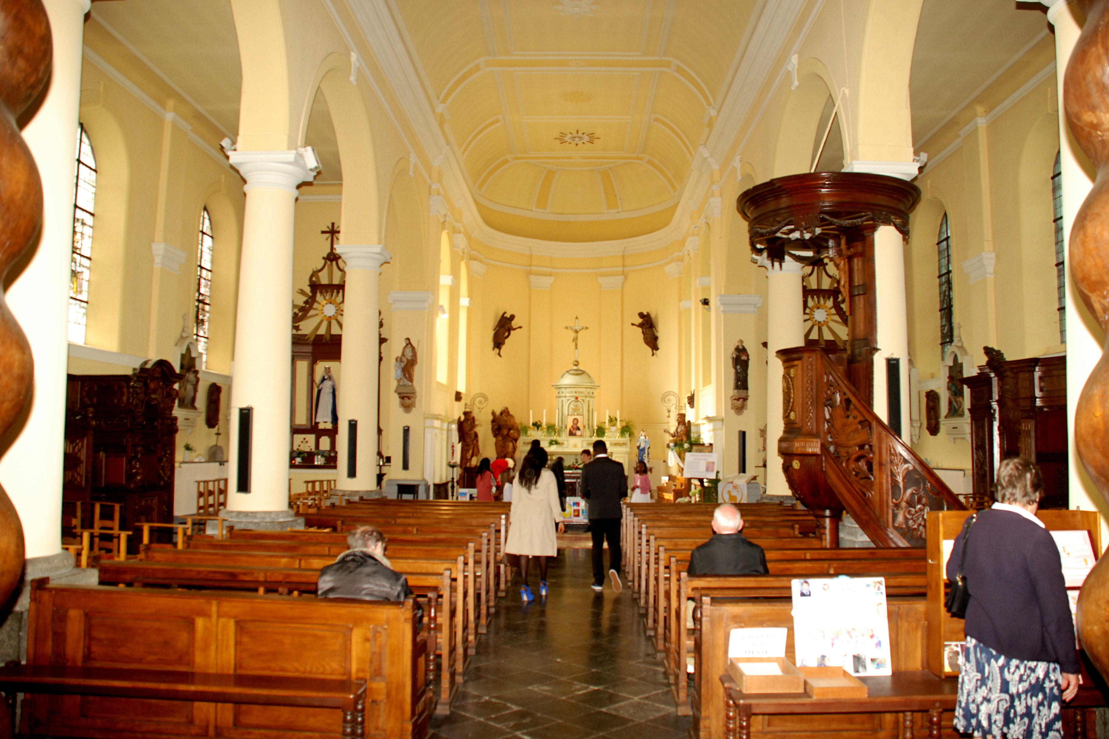 Belgique - Brabant wallon - Mont-Saint-Guibert - Église Saint-Guibert